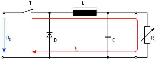 Duerchflosswandler während der Leetphas